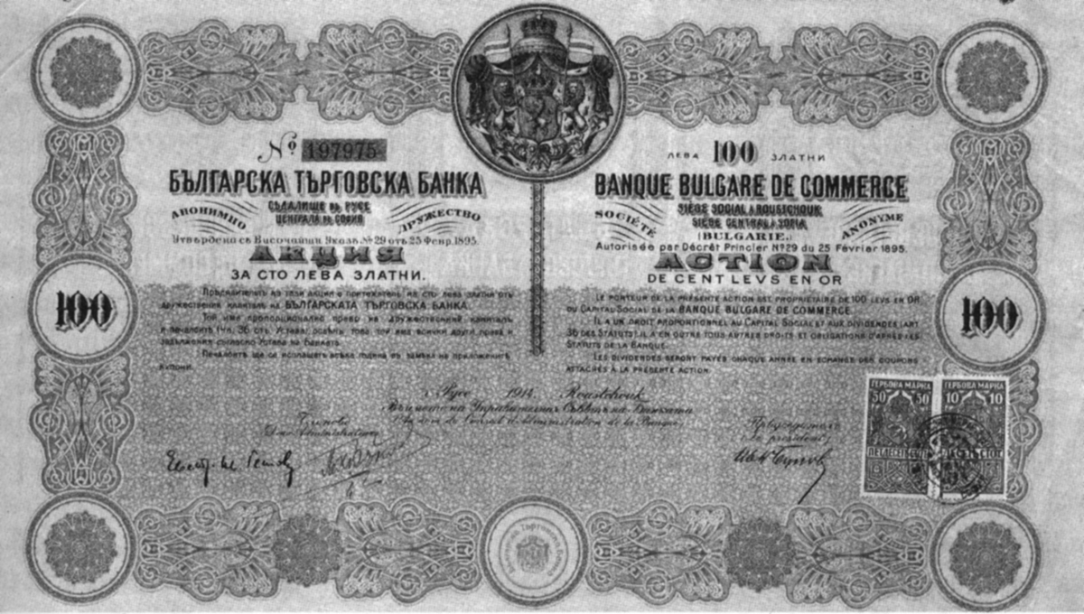 Акция на Българска търговска банка